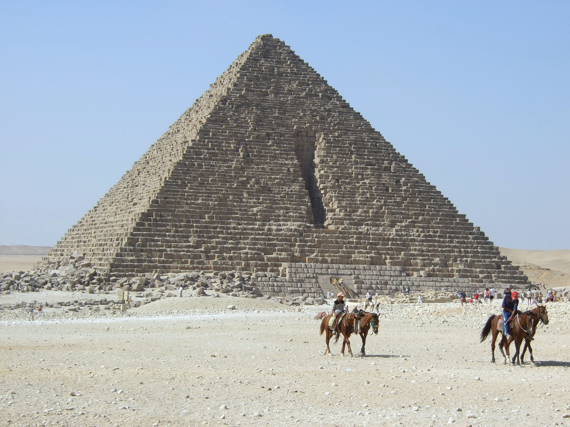 Menkaure's Pyramid, Giza, Egypt